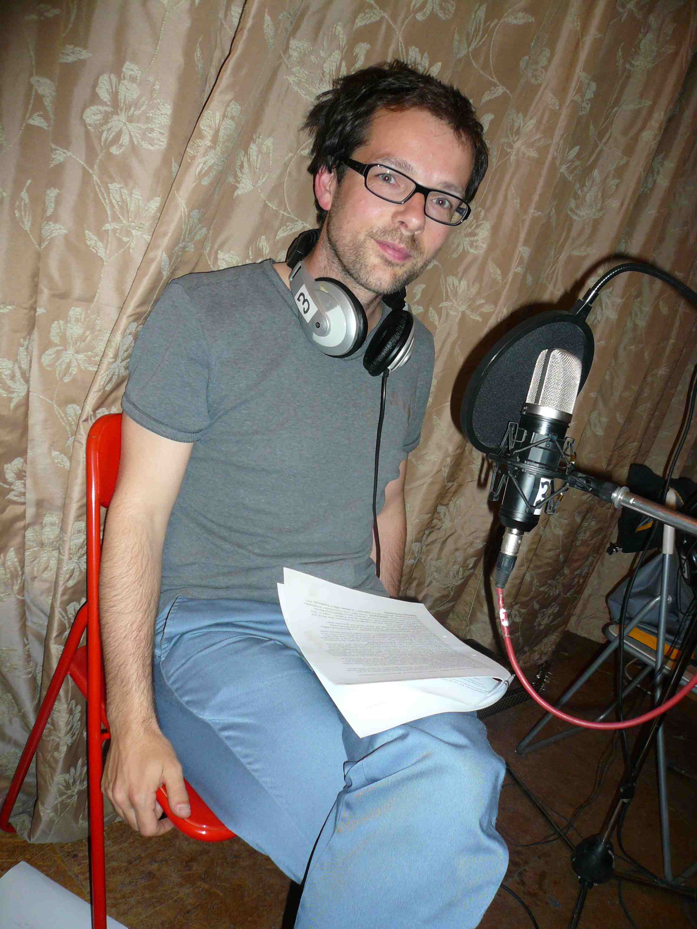 Jan Böttcher am 7. Juli 2010 in Berlin bei der Radiosendung "Radio Hochsee - Das Klingende Hochsee Rätsel #3" im Studio bei Pi Radio.